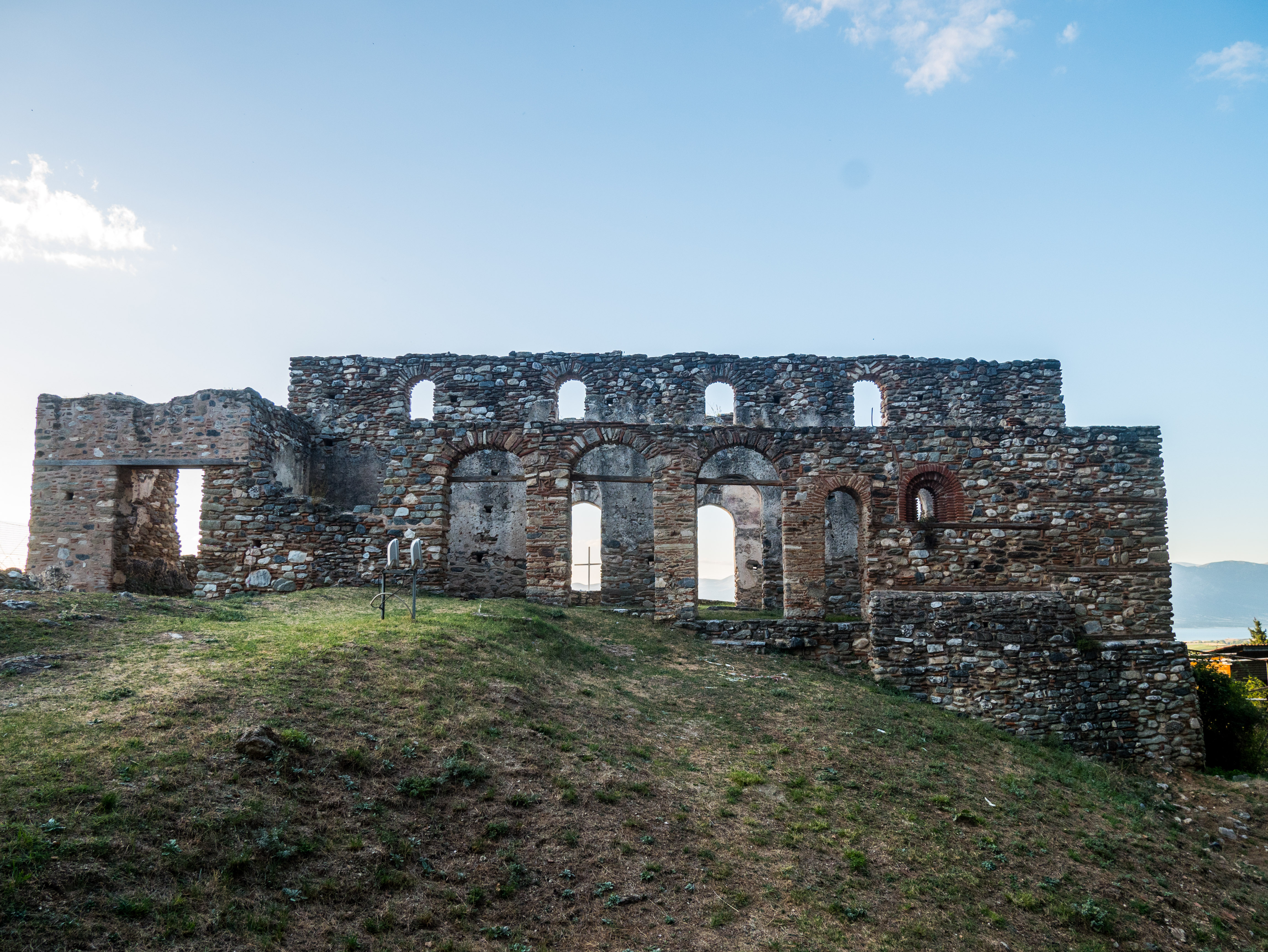 Βασιλική των Κατηχουμένων Σερβίων«Βασιλική των Κατηχουμένων Σερβίων»